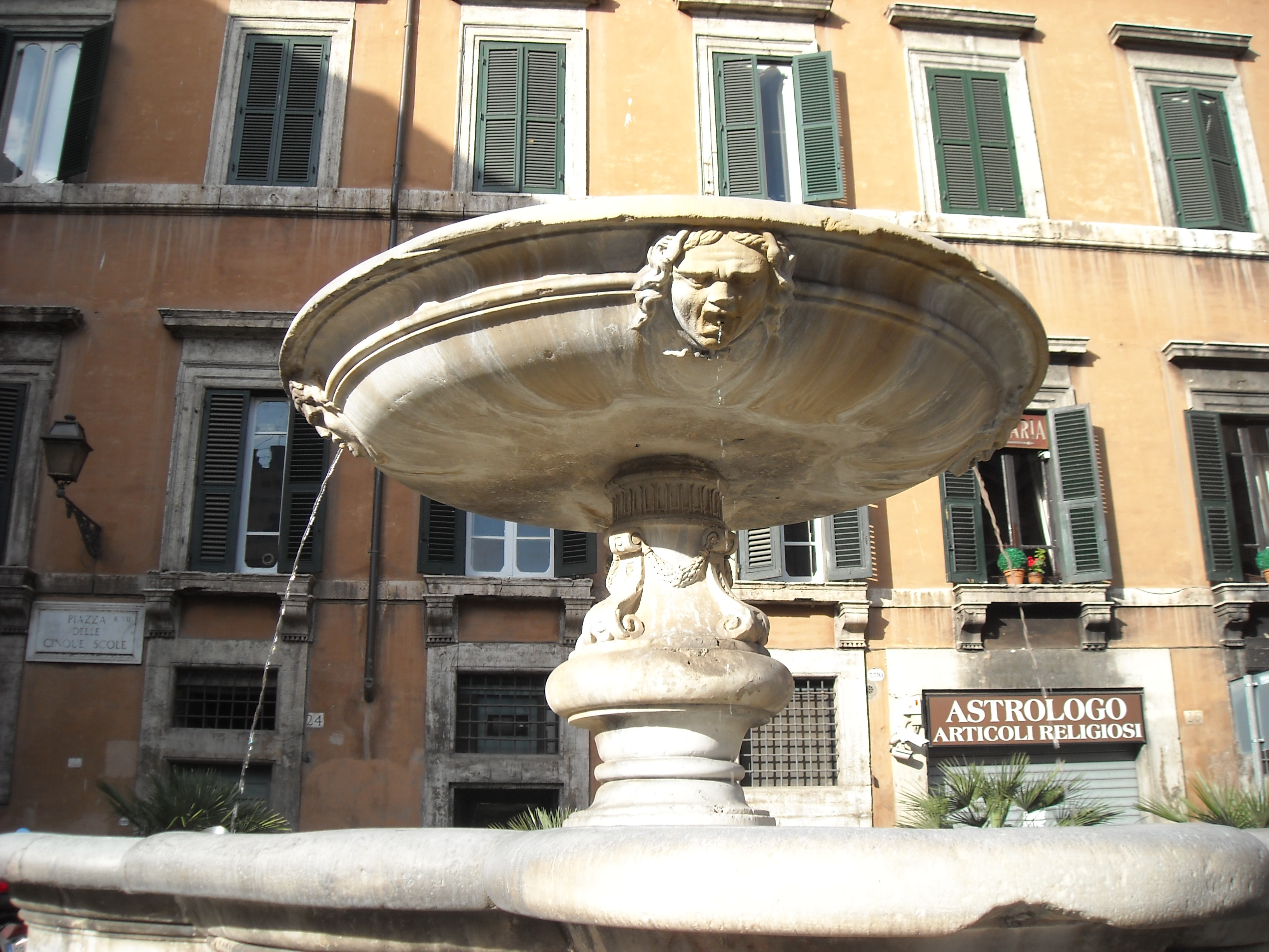 La fontana di piazza delle Cinque Scole - particolare della Gorgone sotto il catino superiore